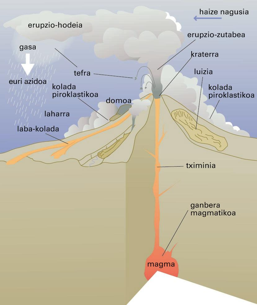 Sistema bolkanikoaren elementuak erakusten dituen ebakidura